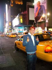 Le rappeur franco-marocain Axiom à New York (États-Unis).